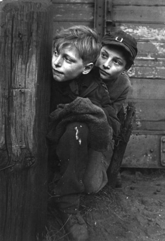 Hamburg, Kohlendiebe, Kinder verstecken sich Illus-dpd Gefährdete Jugend "Pst, ruhe, die Polizei kommt!" Hunderte von Jungen stehen an den Gleisen einer Hamburger Vorortstrecke, passen auf die Kohlenzüge und ... auf die Polizisten auf. Die meisten von ihnen ernähren mit ihren Raubzügen ihre Familienangehörigen, Kinder unserer Zeit, die für ein paar Pfund Kohlen Freiheit und oftmals auch Leben riskieren. 5-2-48 [Herausgabedatum]